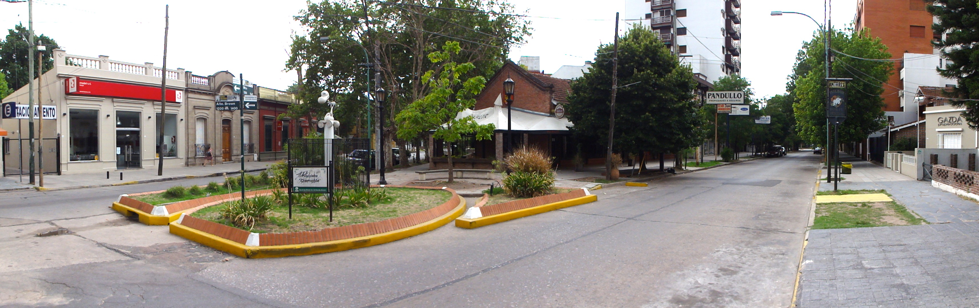 Emplazado en la intersección de las calles Mitre y Diagonal Almirante Brown